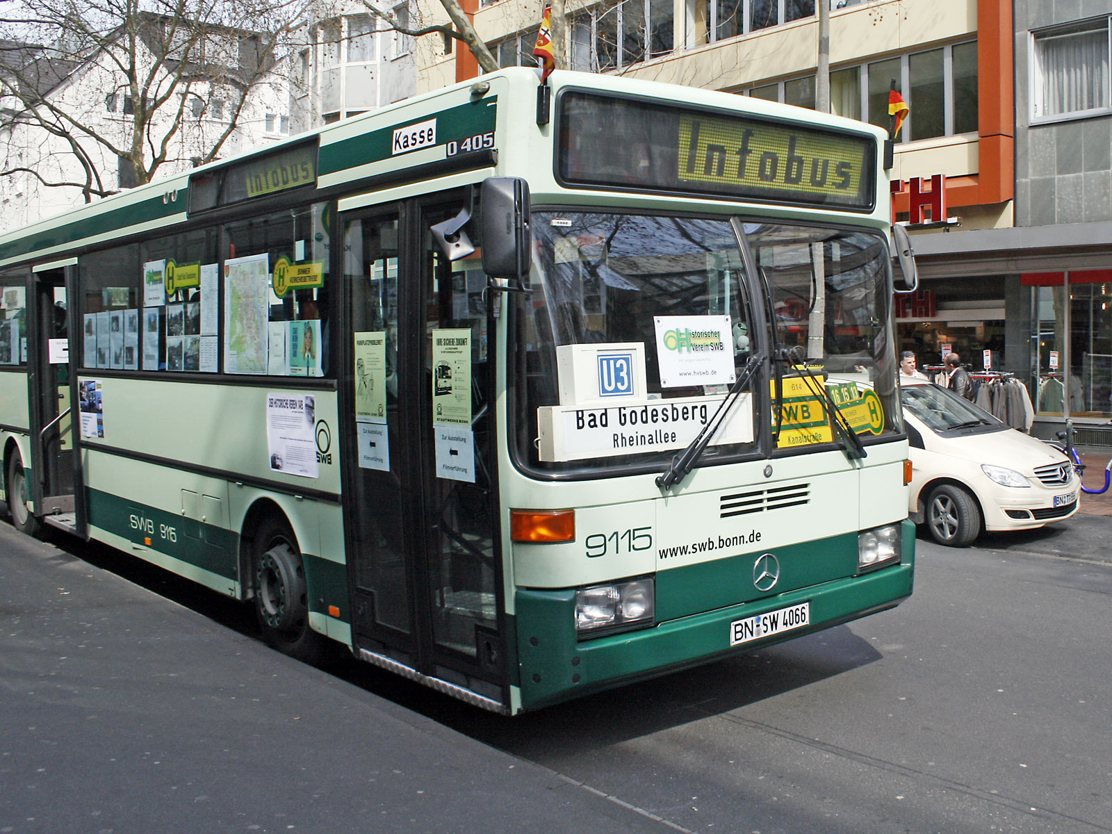 Infobus des "Historischen Vereins Stadtwerke Bonn".